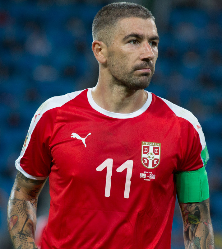 Сборная Бразилии оставляет Сербию за бортом ЧМ-2018 и выходит в плей-офф